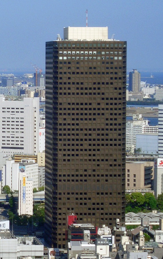 浜松町付近ビル(東京タワー展望台から撮影)